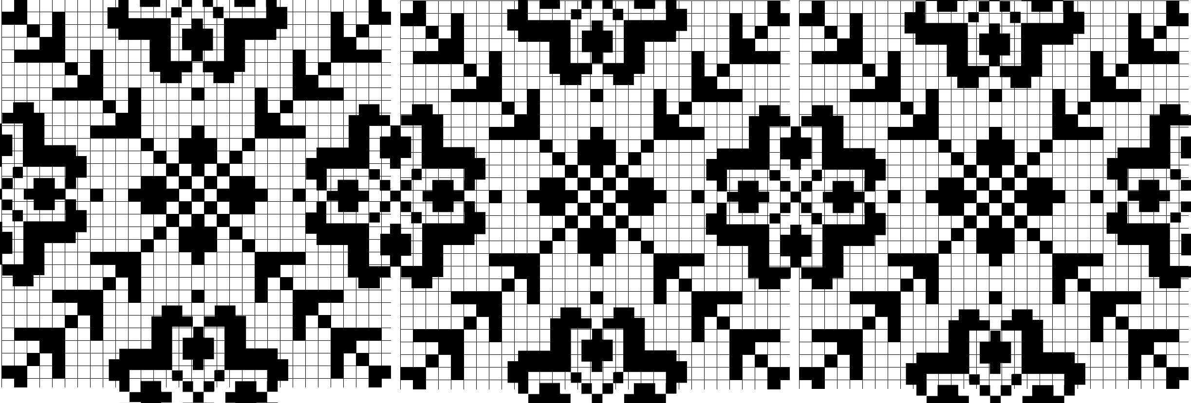 Motif tricot norvégien, skartrell et tellros